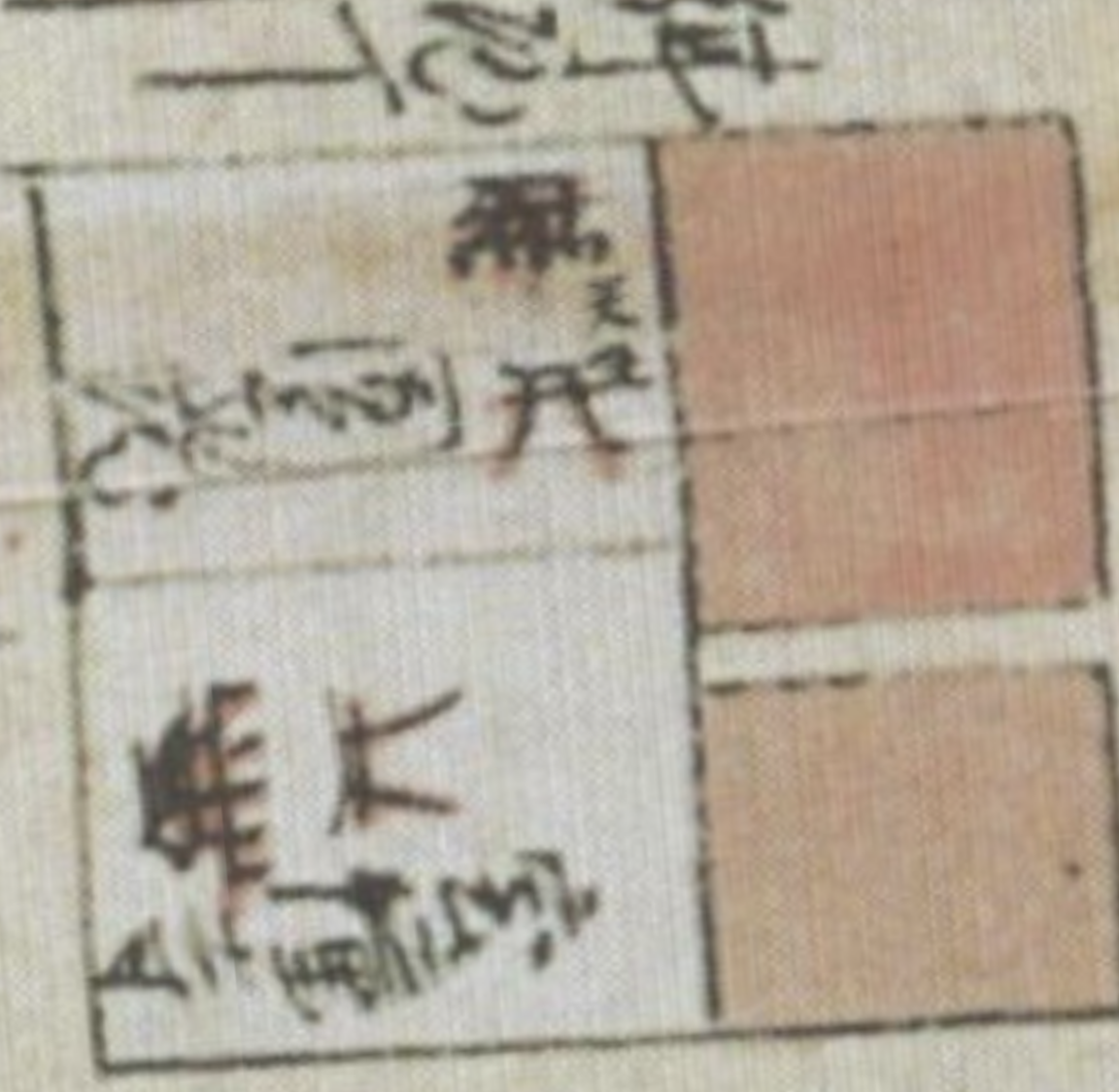 館林青梅天満宮 秋元時代の青梅天満宮 館林城絵図（秋元時代）より抜粋